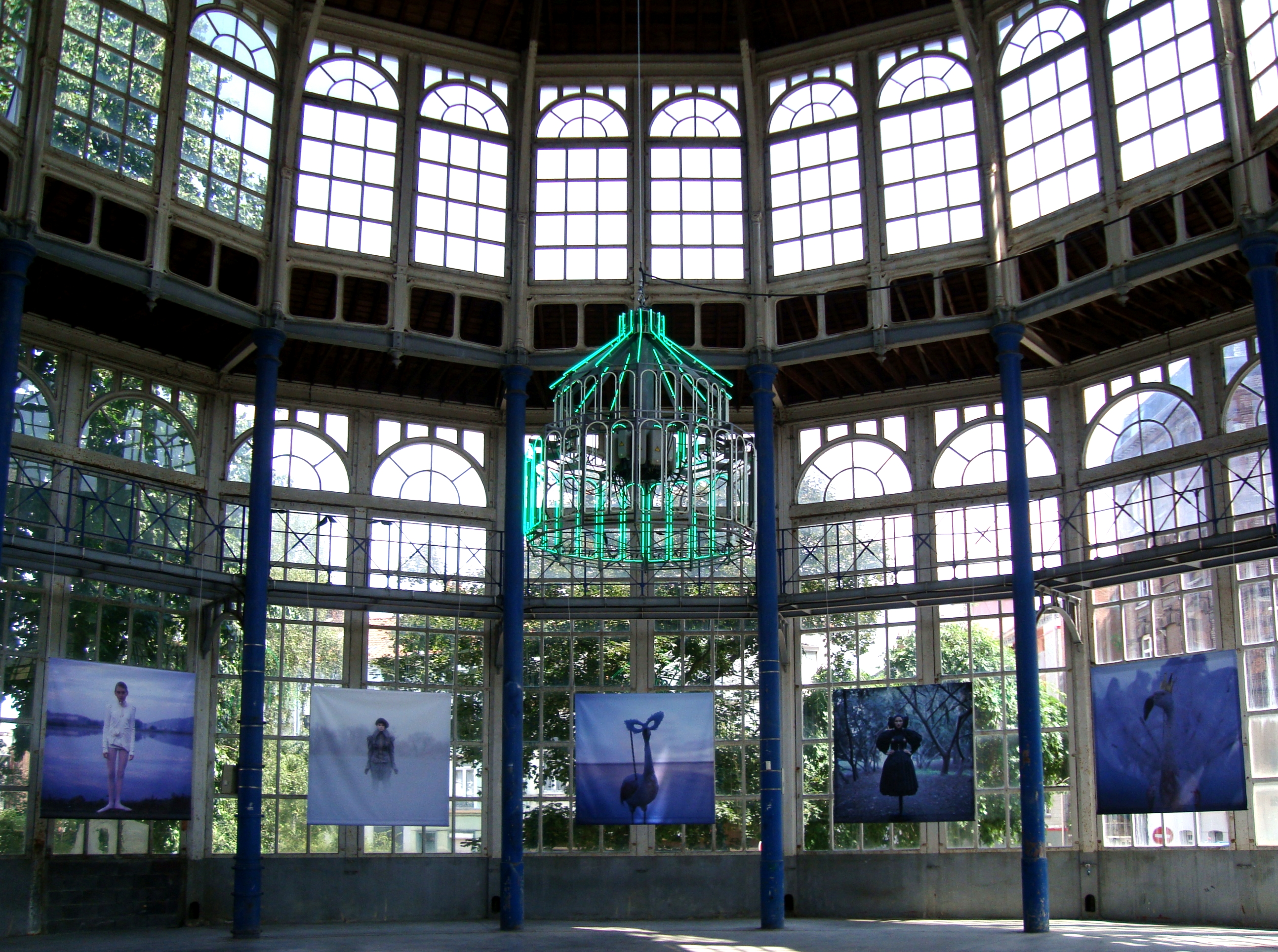 La serre du Palais Rameau à Lille (Nord) lors du festival des transphotographiques.